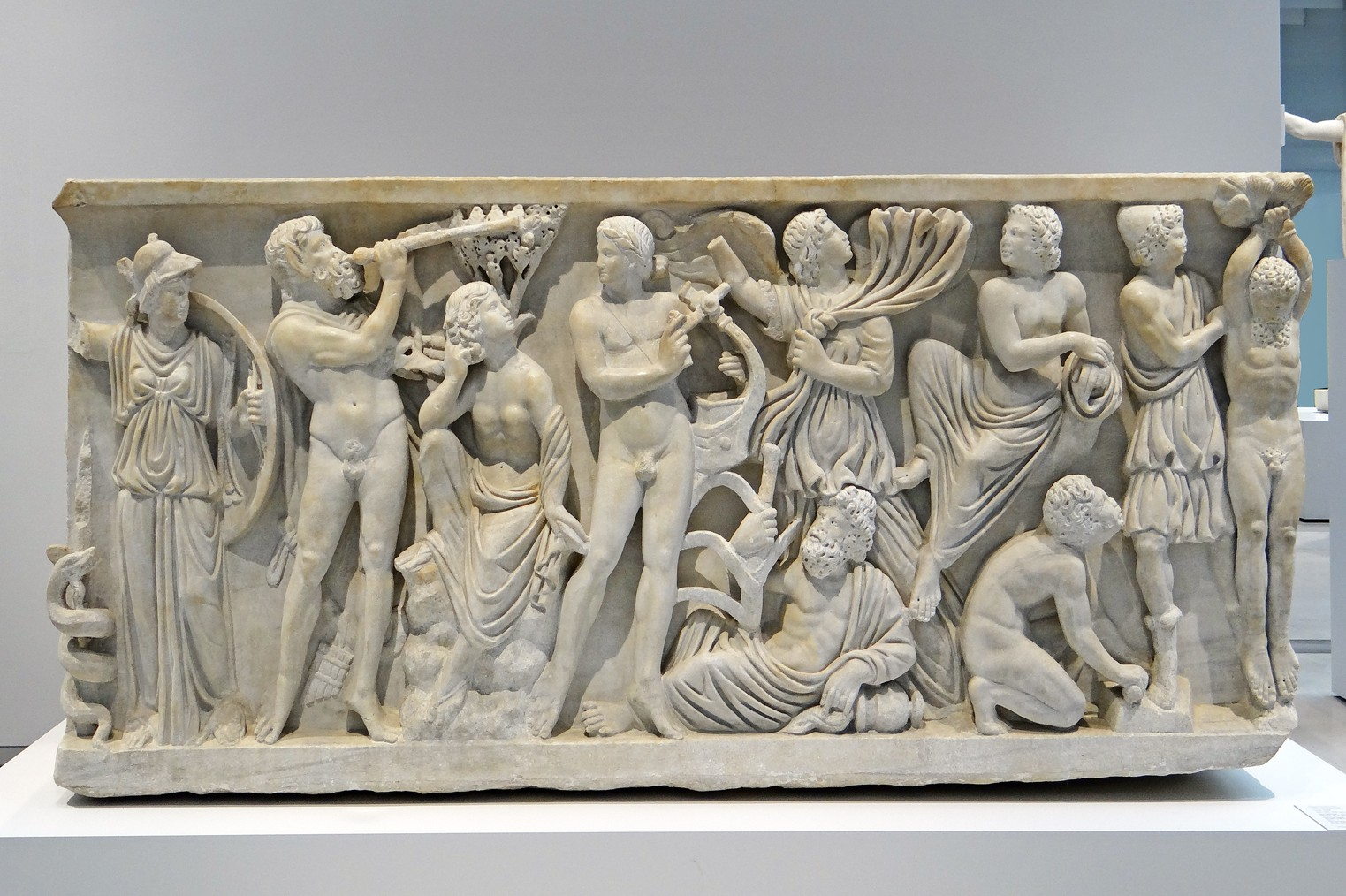 Concours musical entre le dieu Apollon jouant de la lyre et le satyre Marsyas jouant de l'aulos Détail de la façade sculptée d'un sarcophage vers 290-300 après J.-C. Cosa, Italie Marbre Oeuvre exposée dans la Galerie du Temps, secteur Antiquité / Empire romain Louvre Lens